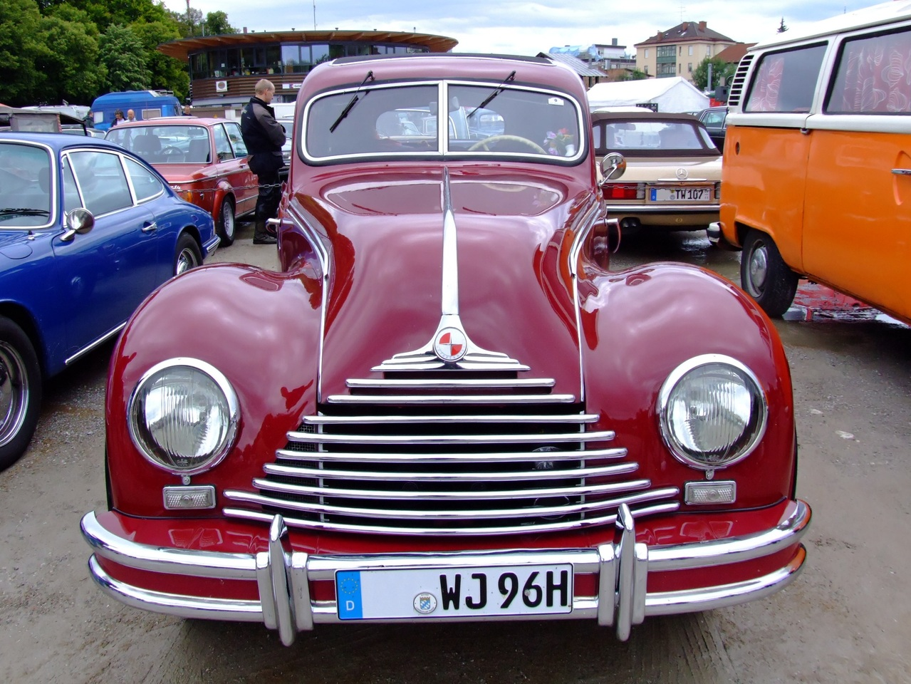 Quelle: selbst fotografiert, 07/2007 Fotograf: Späth Chr.